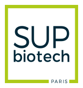 Logo de l’Institut supérieur de biotechnologies de Paris